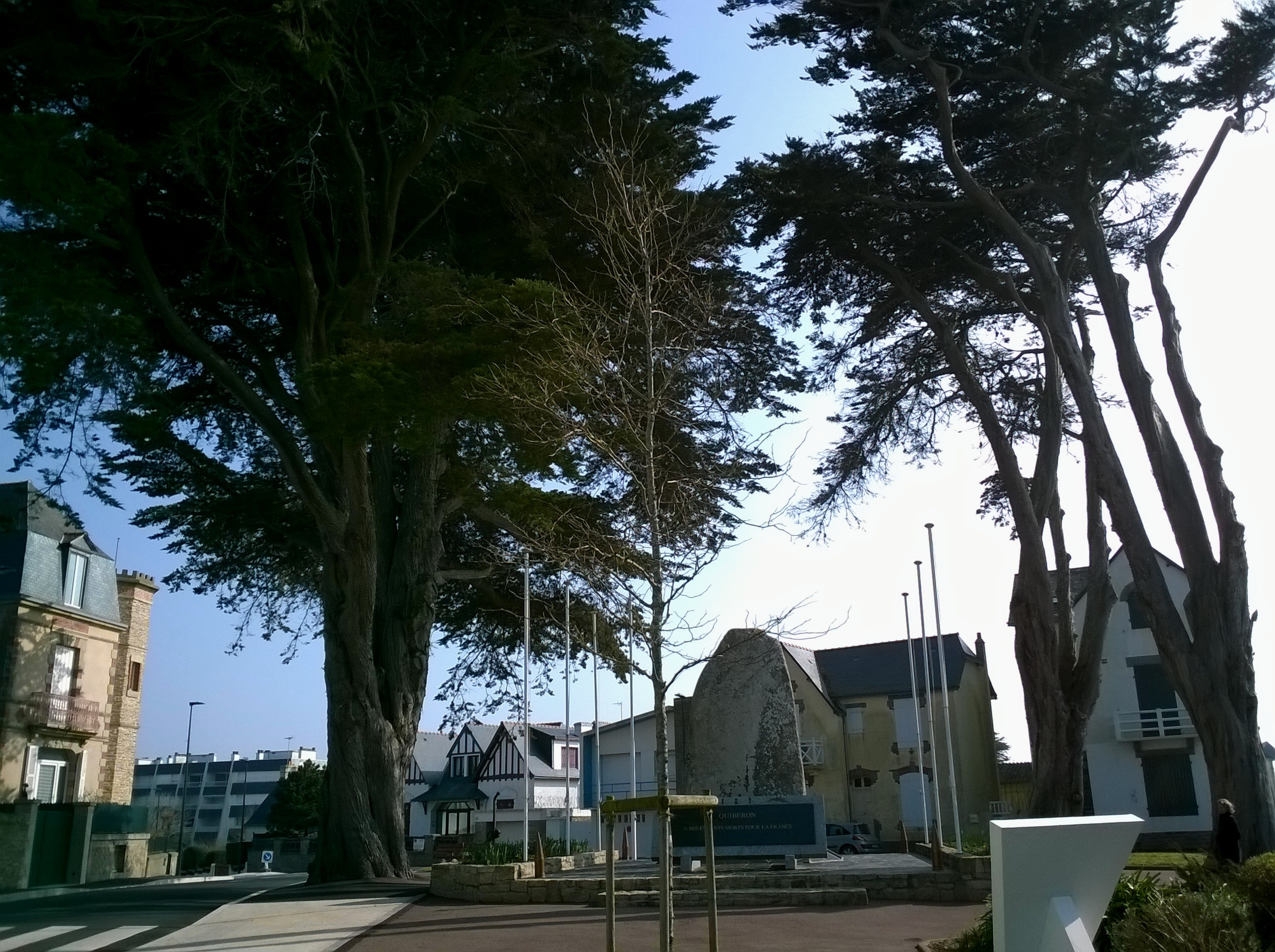 Morbihan Quiberon Rue Pouligner Monument Aux Morts Menhir 20032016